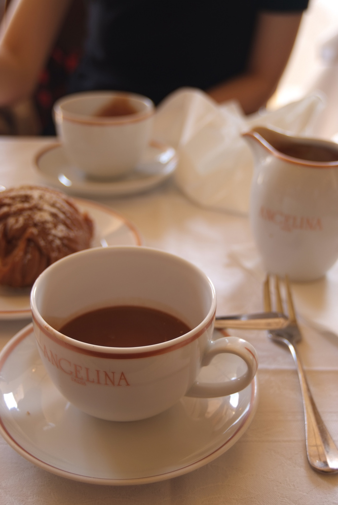 Chocolat Chaud Angelina cafe